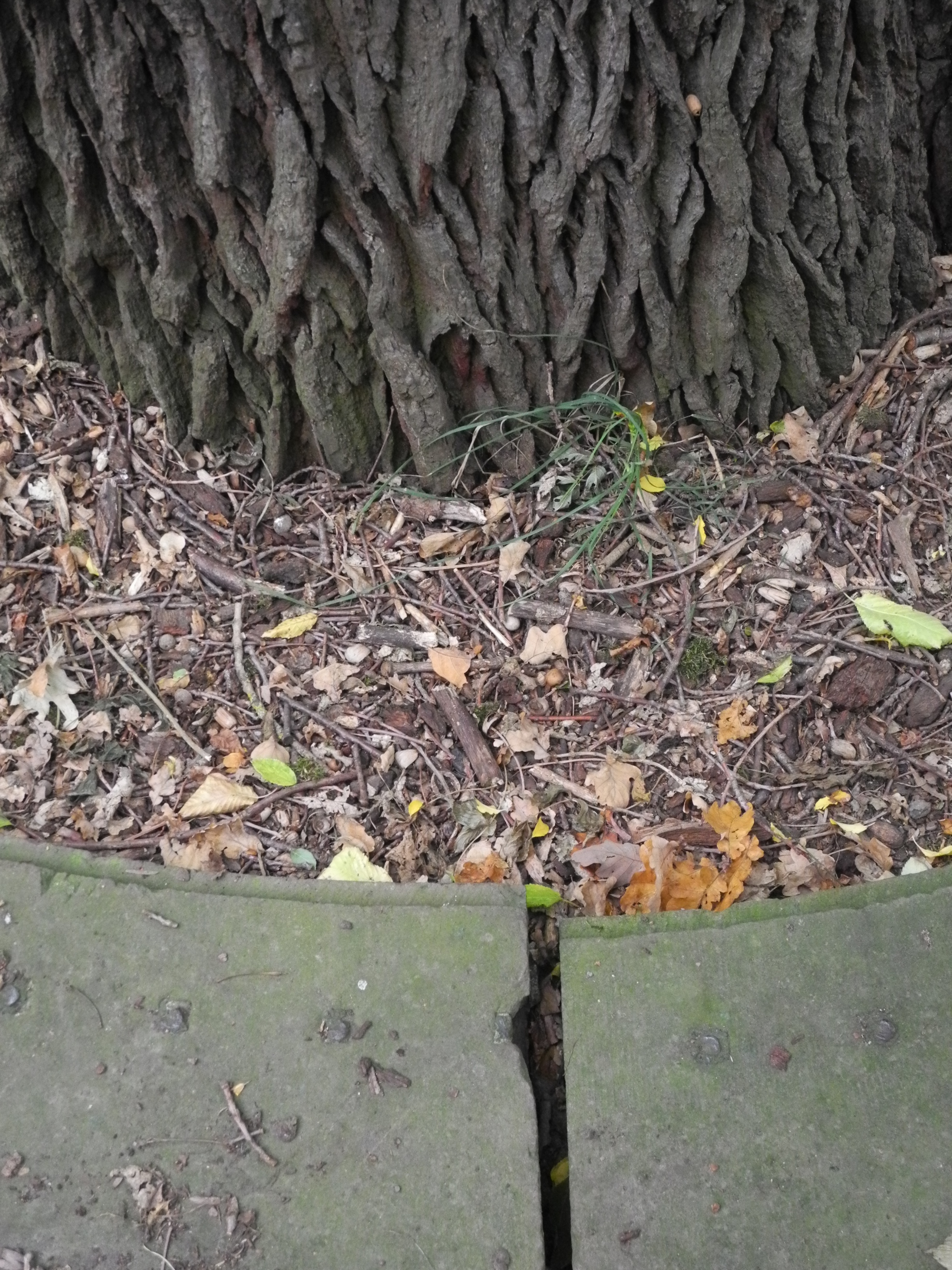 Naturdenkmal in Kassel 611.077. "1 Stieleiche" (Quercus robur) - Eichwaldstraße, am südlichen Waldrand des Eichwaldes.